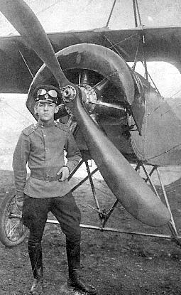 Авiаторъ прапорщикъ Алелюхинъ